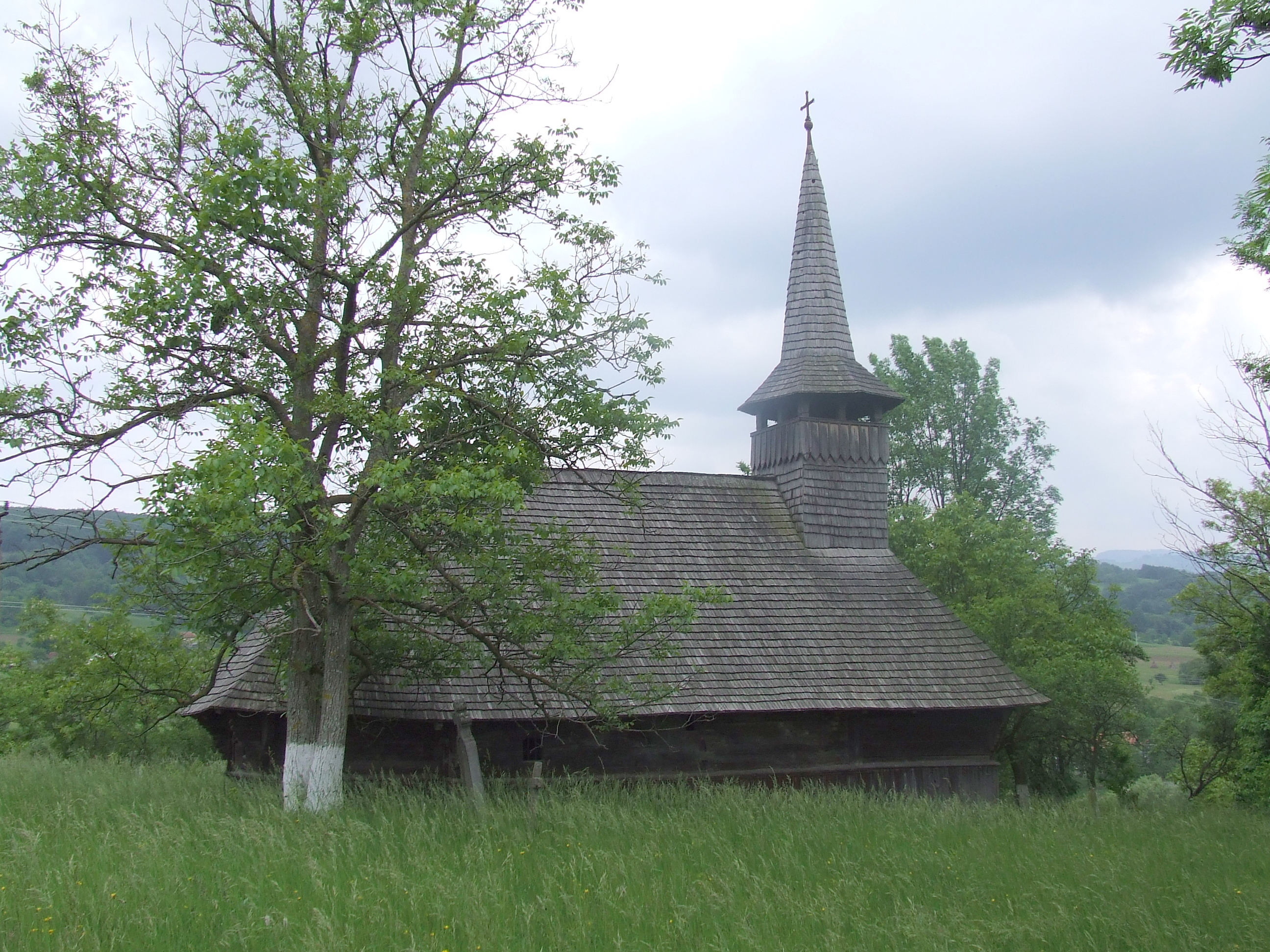 Biserica de lemn din Valea Crişului, judeţul Bihor. Vedere de ansamblu.